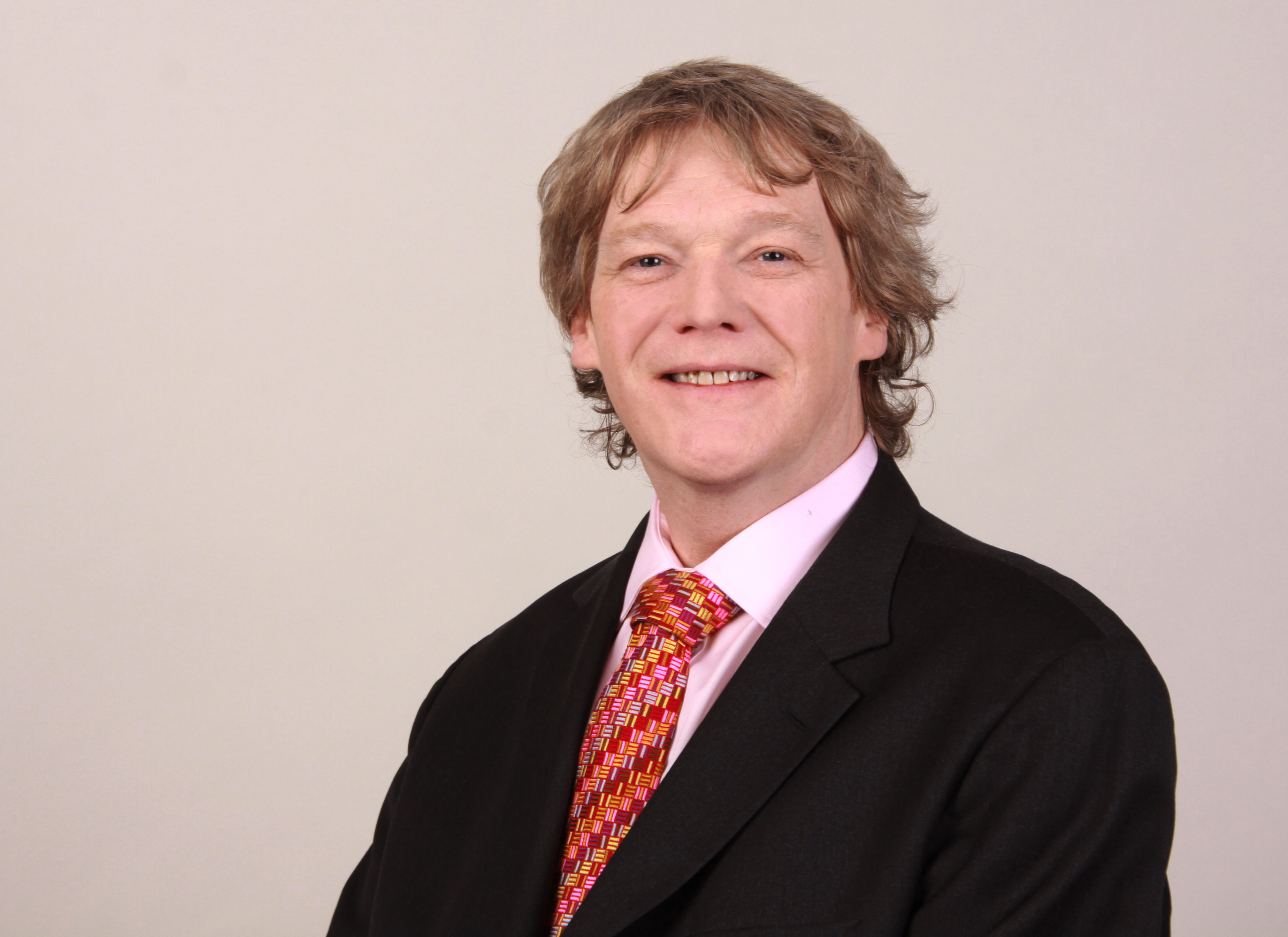 Abgeordnete/r Europaparlament